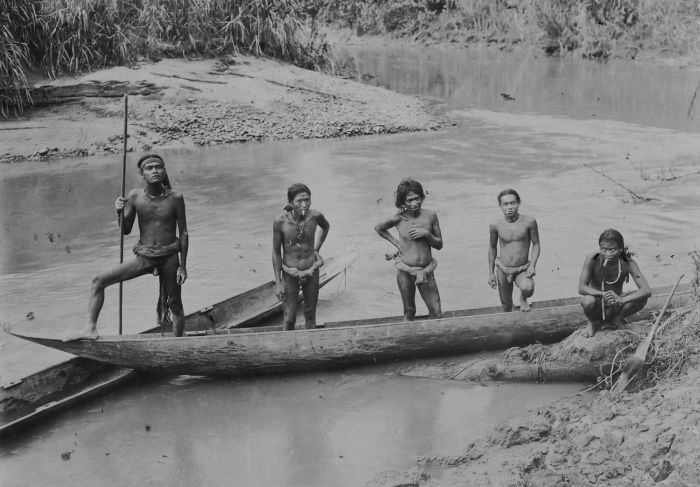 foto. Rokende of kauwende Mentawai mannen bij hun kano's in een rivier op Siberoet